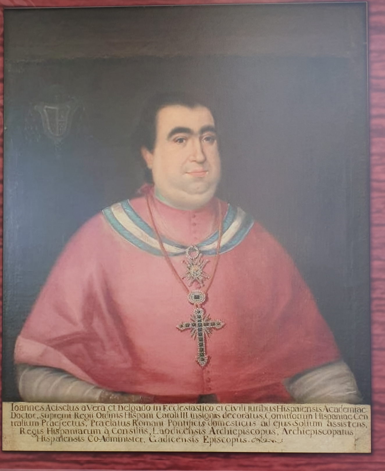 Juan Acisclo de Vera. Retrato que se conserva en el Despacho Parroquial de la Parroquia de Santa María de las Nieves de Villanueva del Ariscal.